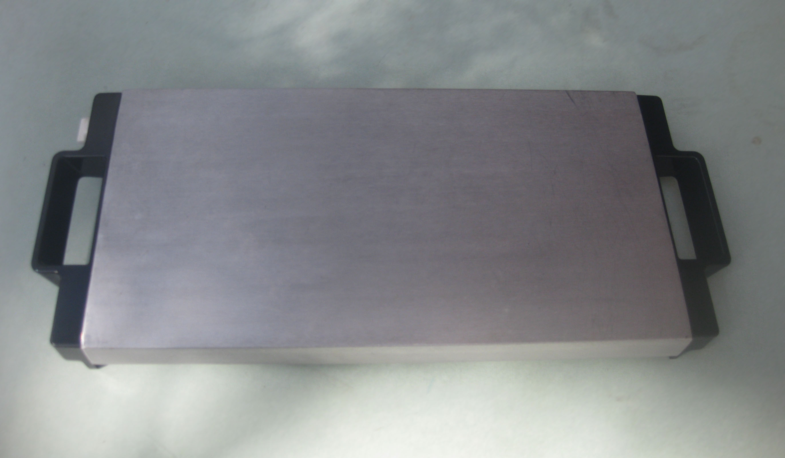 Gastronomie-Warmhalteplatte "acosta variant"